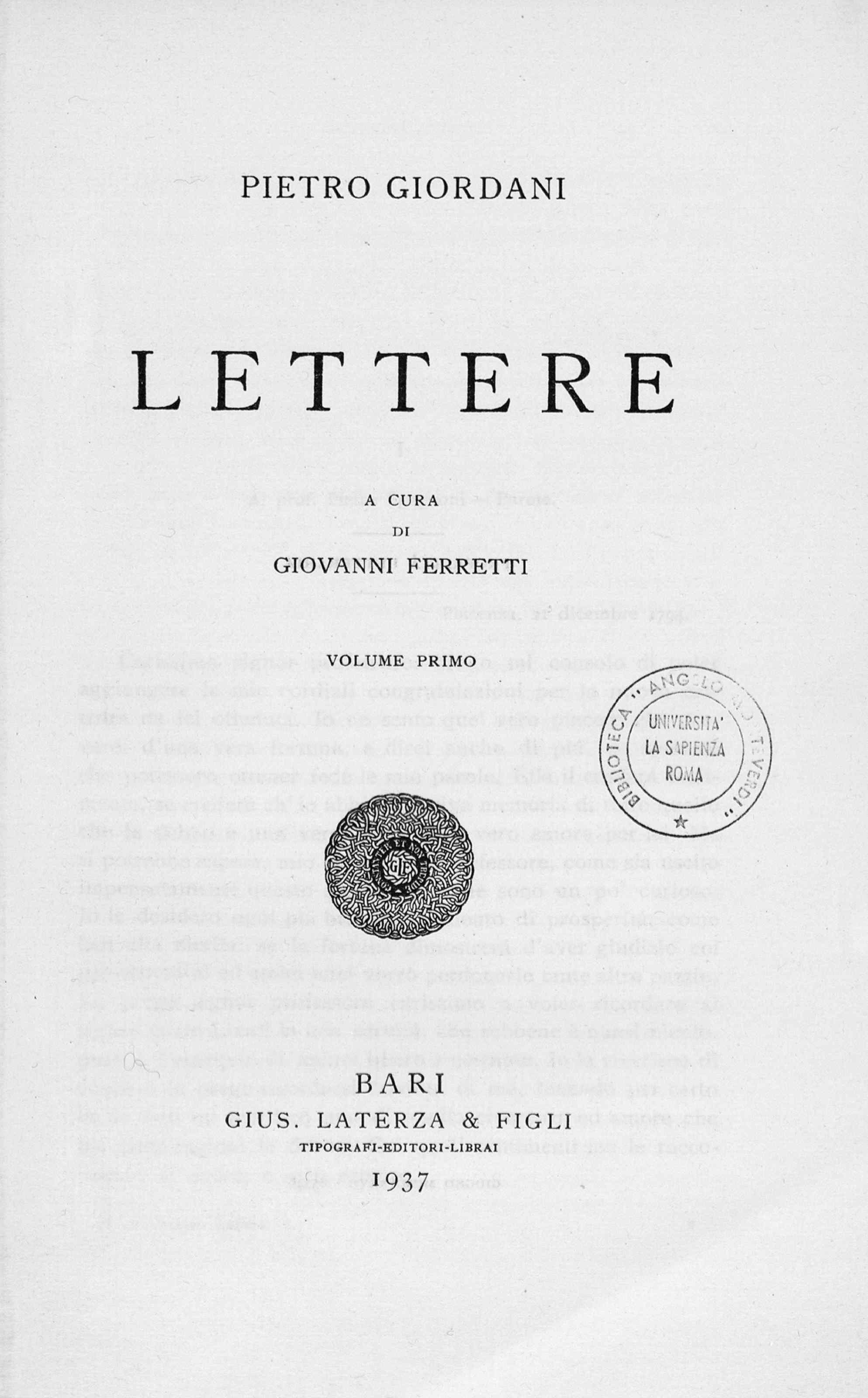 1: Lettere / Pietro Giordani ; a cura di Giovanni Ferretti. 1. - Bari : G. Laterza, 1937. - 318 p. ; 22 cm. - (Scrittori d'Italia ; 163) . Frontespizio